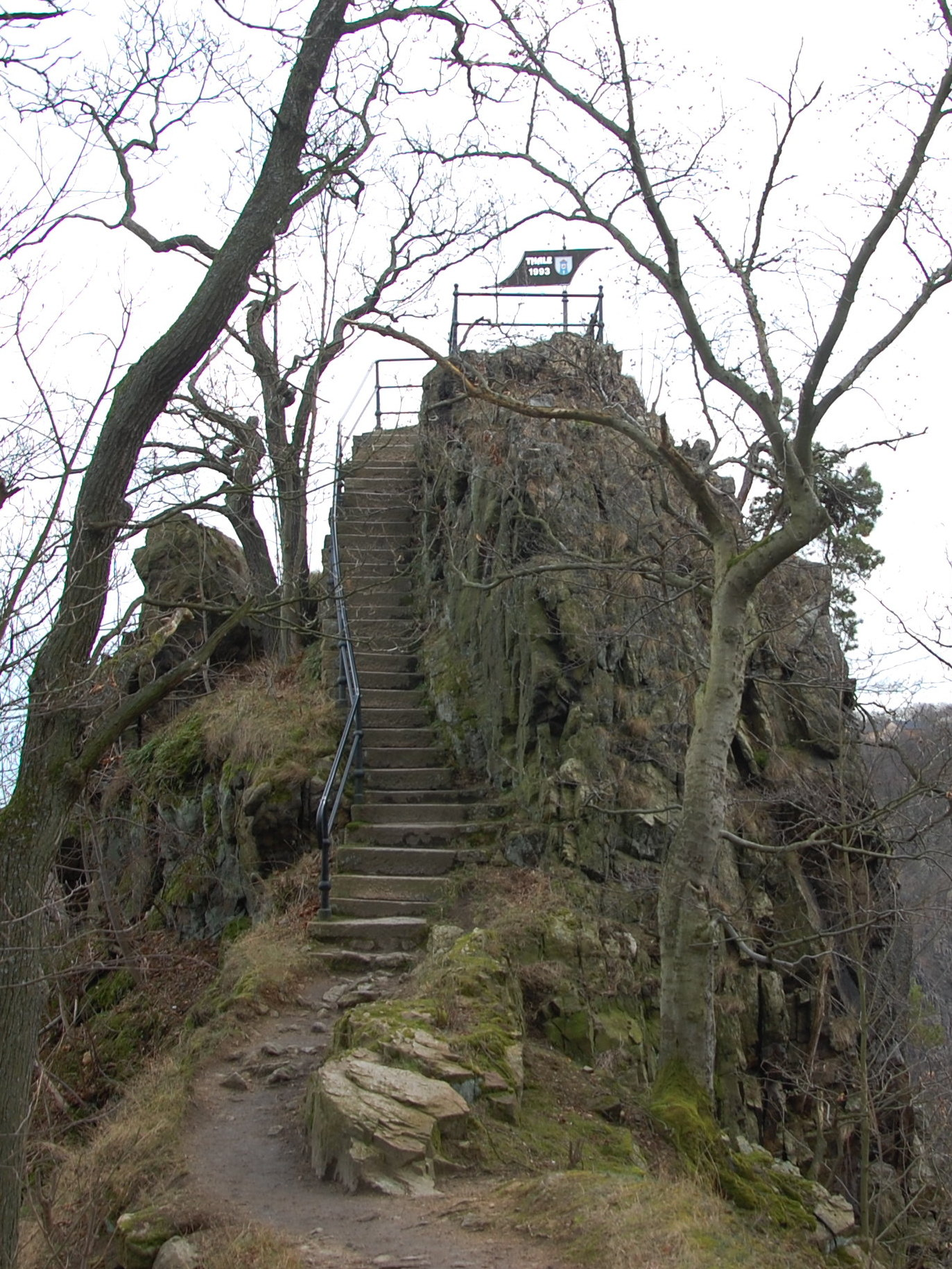 Bülowhöhe in Thale